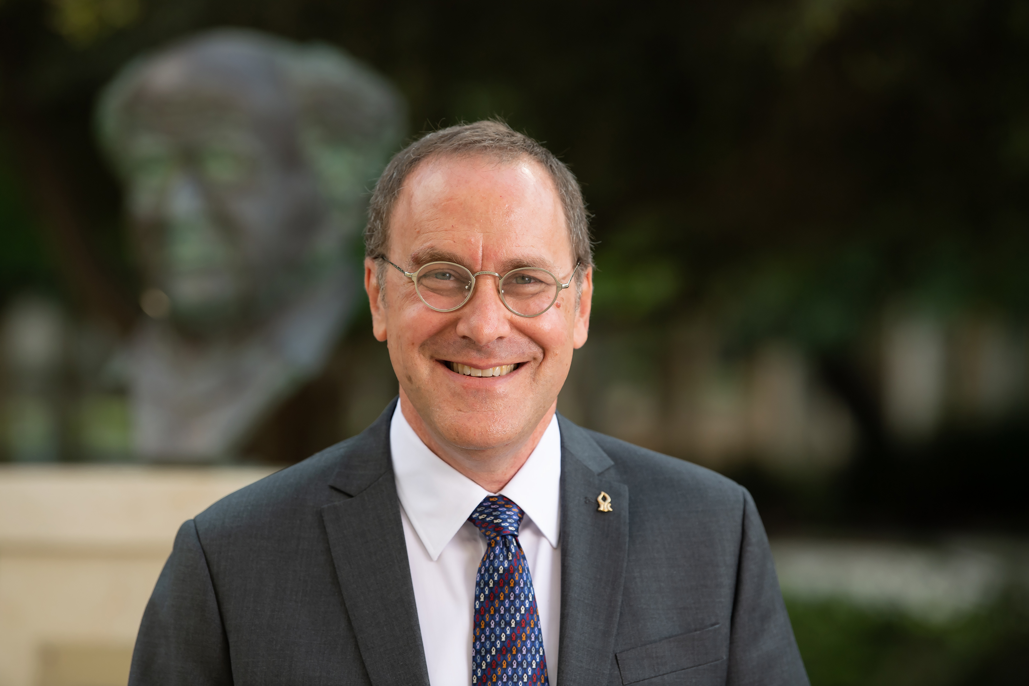 Daniel Chamovitz